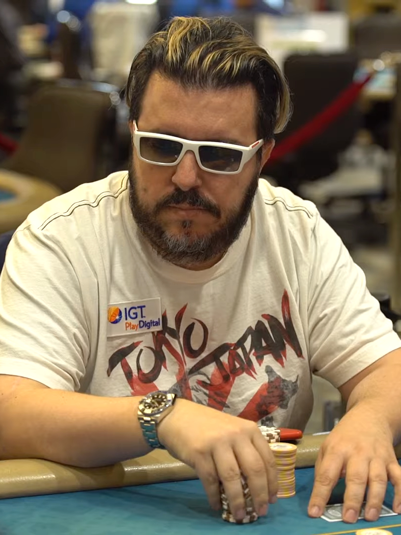 Max Pescatori bei der WPT Gardens